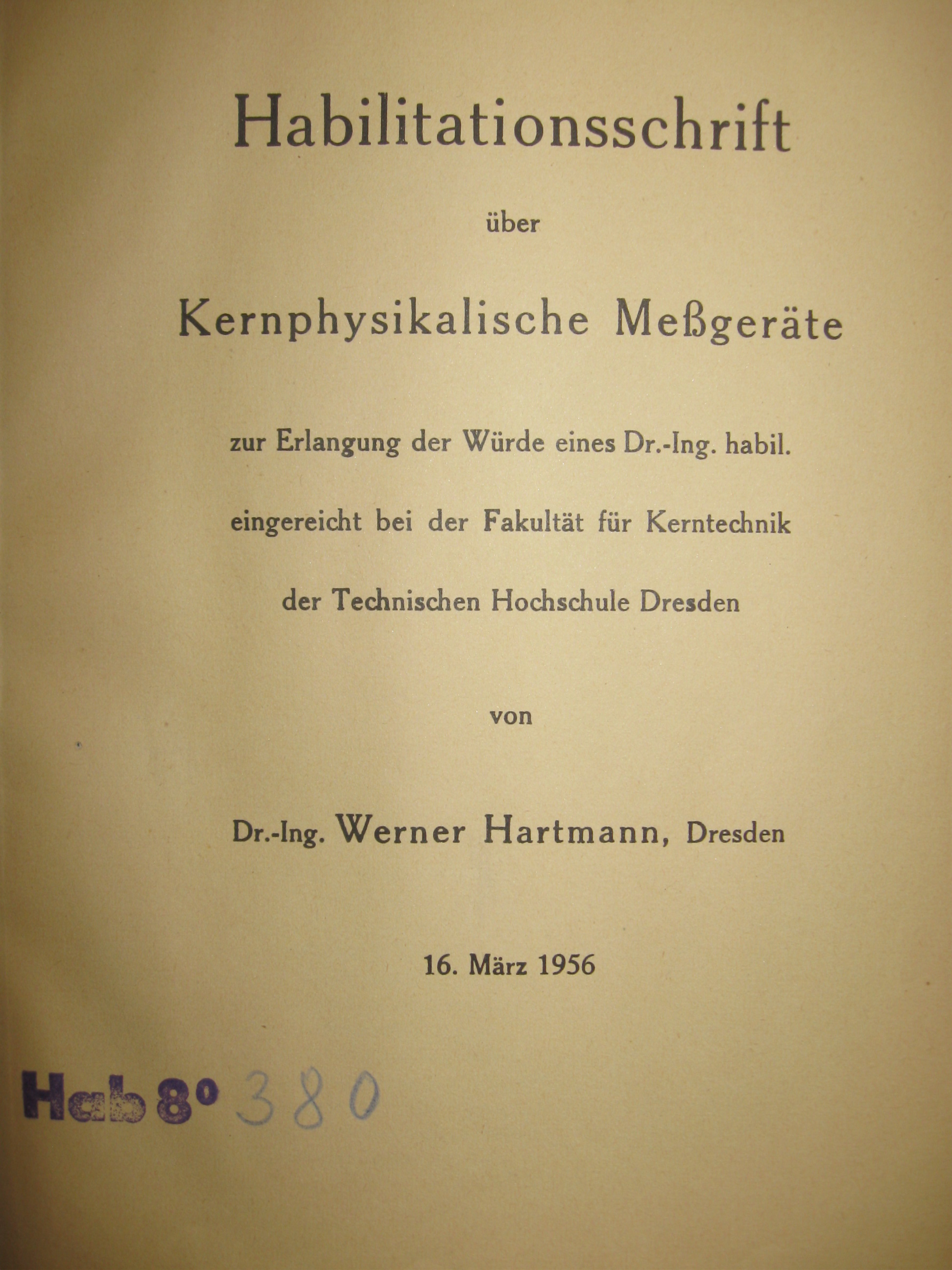 Titelblatt der Habilitationsschrift von Prof. Dr.-Ing. Werner Hartmann (Physiker) vom 16. März 1956, Technische Hochschule Dresden